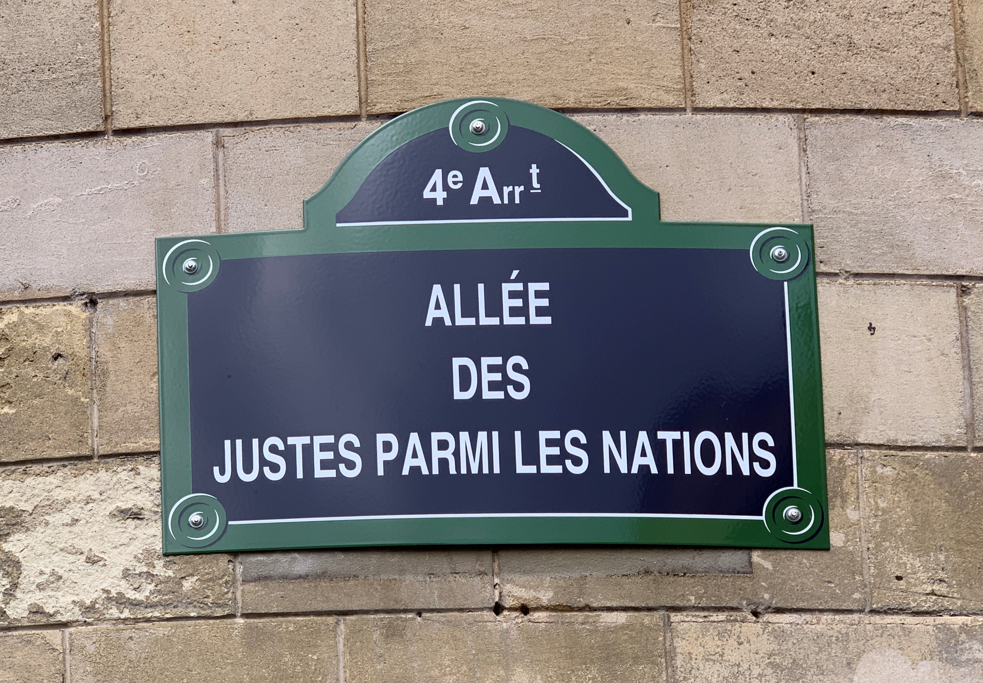 Plaque de l'Allée des Justes parmi les Nations